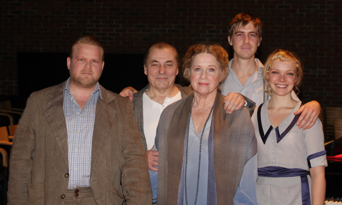 Besetningen i Riksteaterets oppsetning av Lang dags ferd mot natt i 2101. Anders Baasmo Christiansen, Bjørn Sundquist, Liv Ullmann, Pål Sverre Valheim Hagen og Viktoria Winge